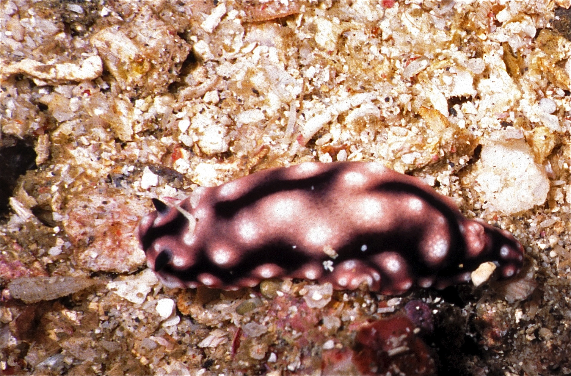 Lembeh Strait, Sulawesi, INDONESIA